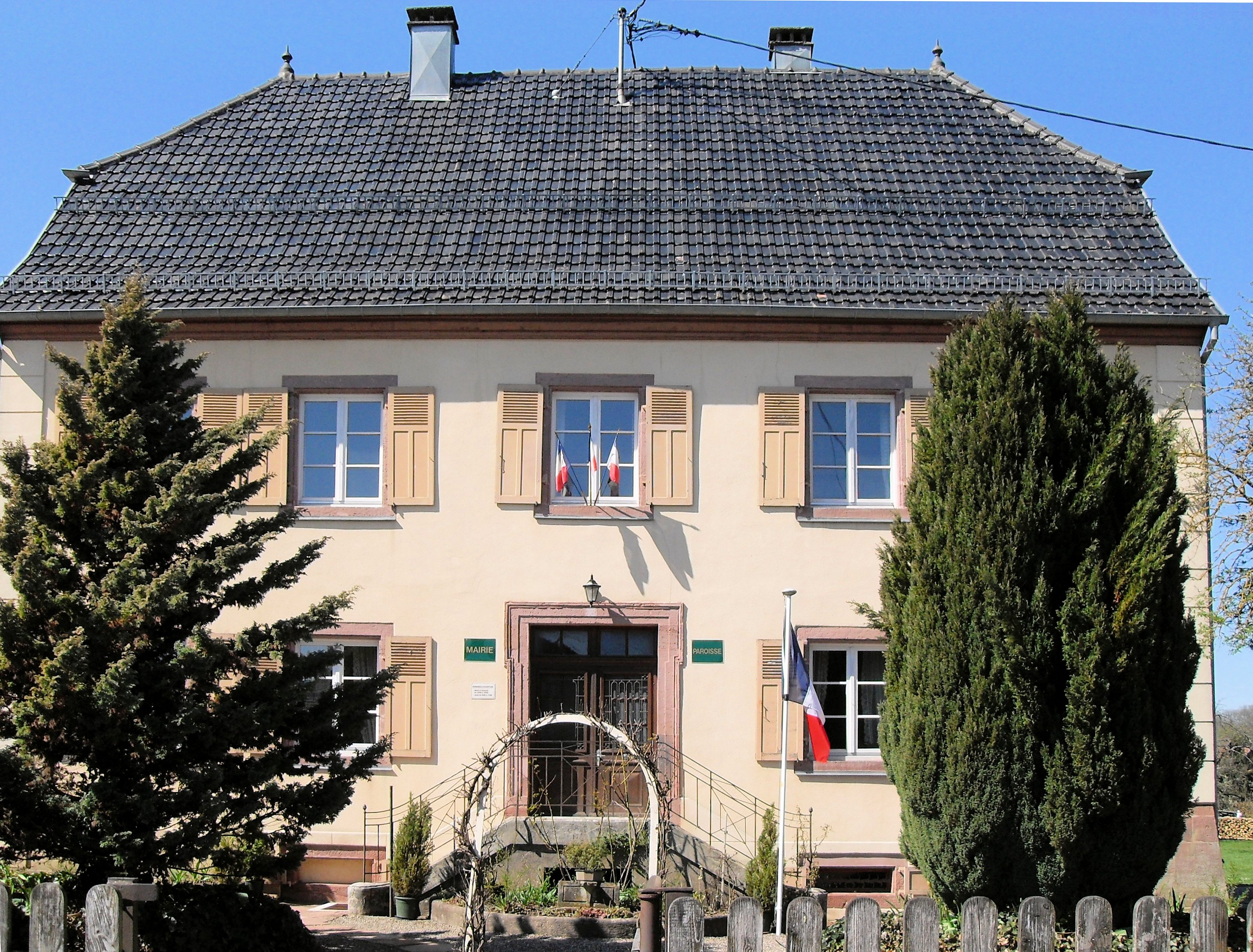 La mairie de Soppe-le-Haut